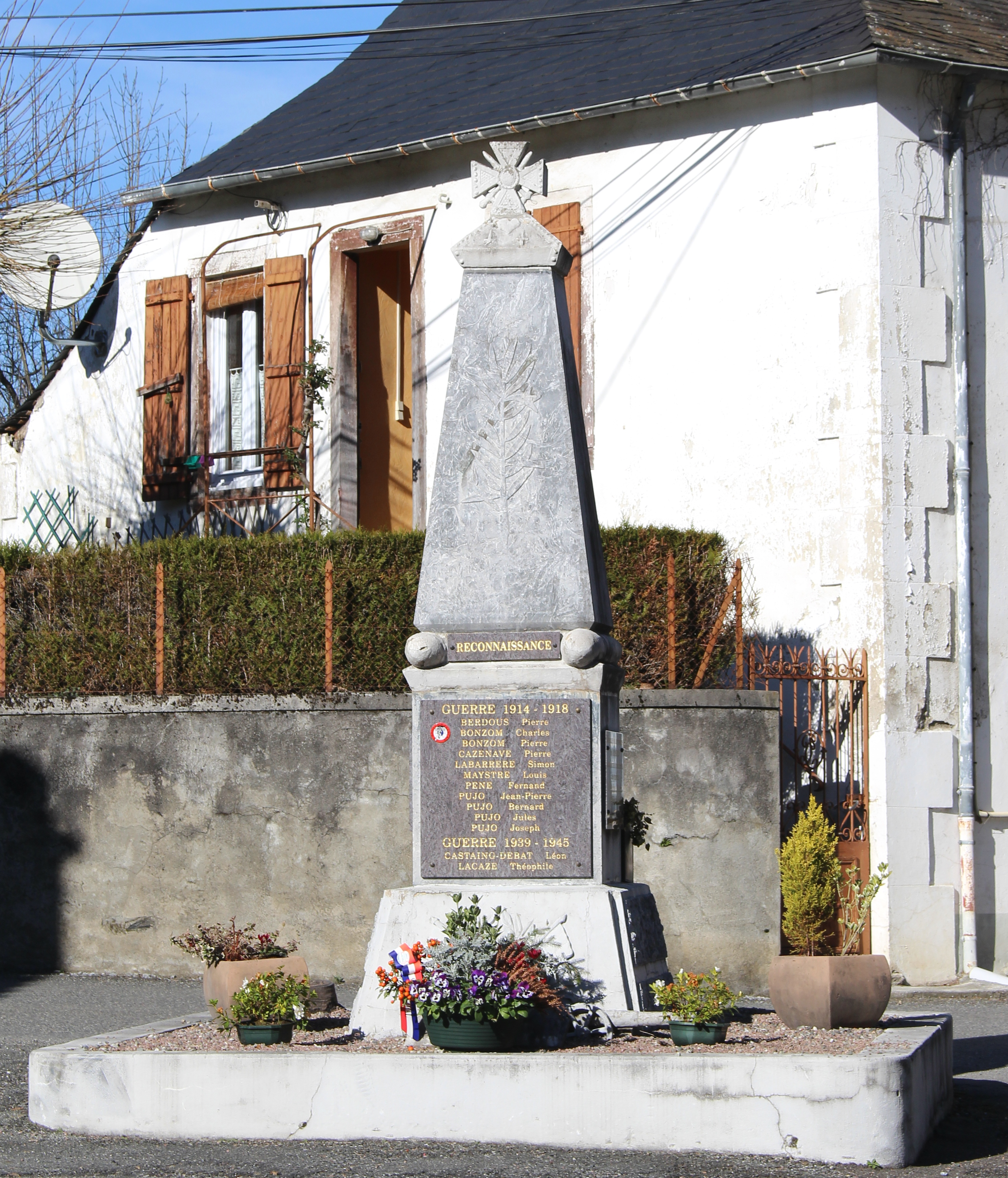 Monument aux morts de Lugagnan (Hautes-Pyrénées)